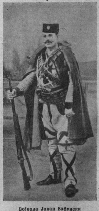 Yovan Babunski